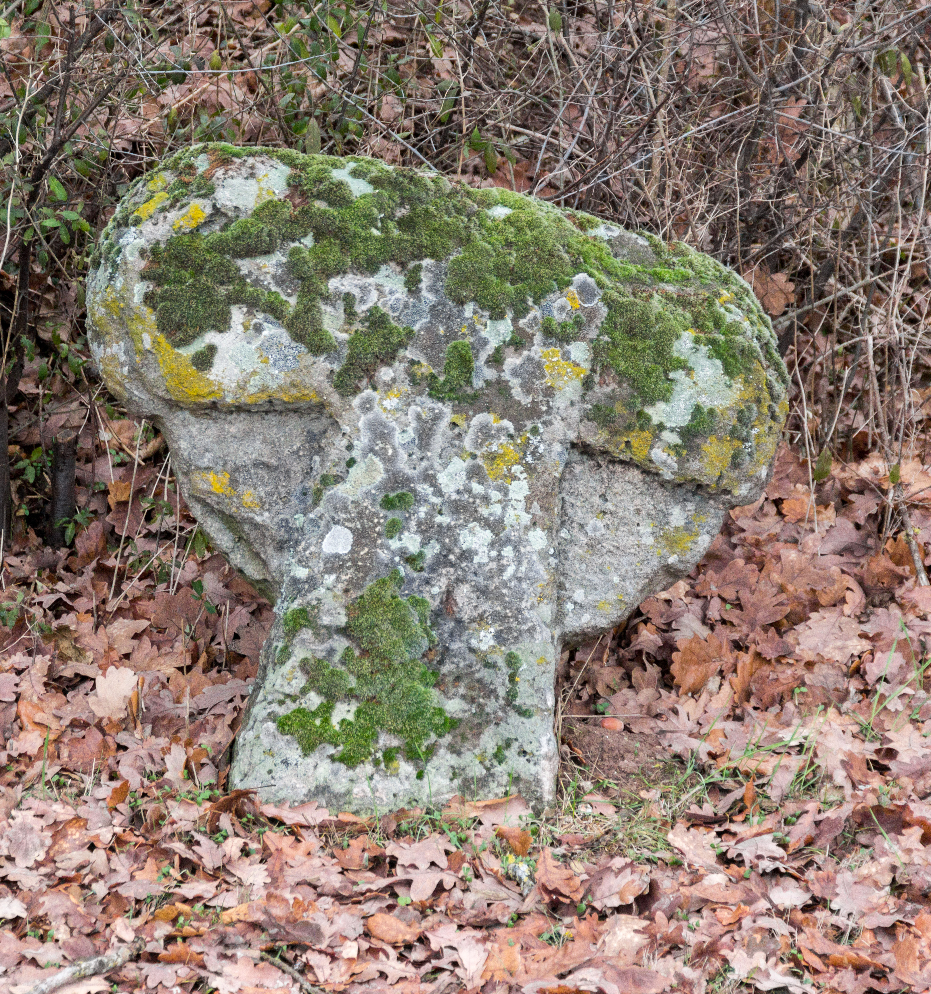 Steinkreuz, Weidenbach, Baudenkmal